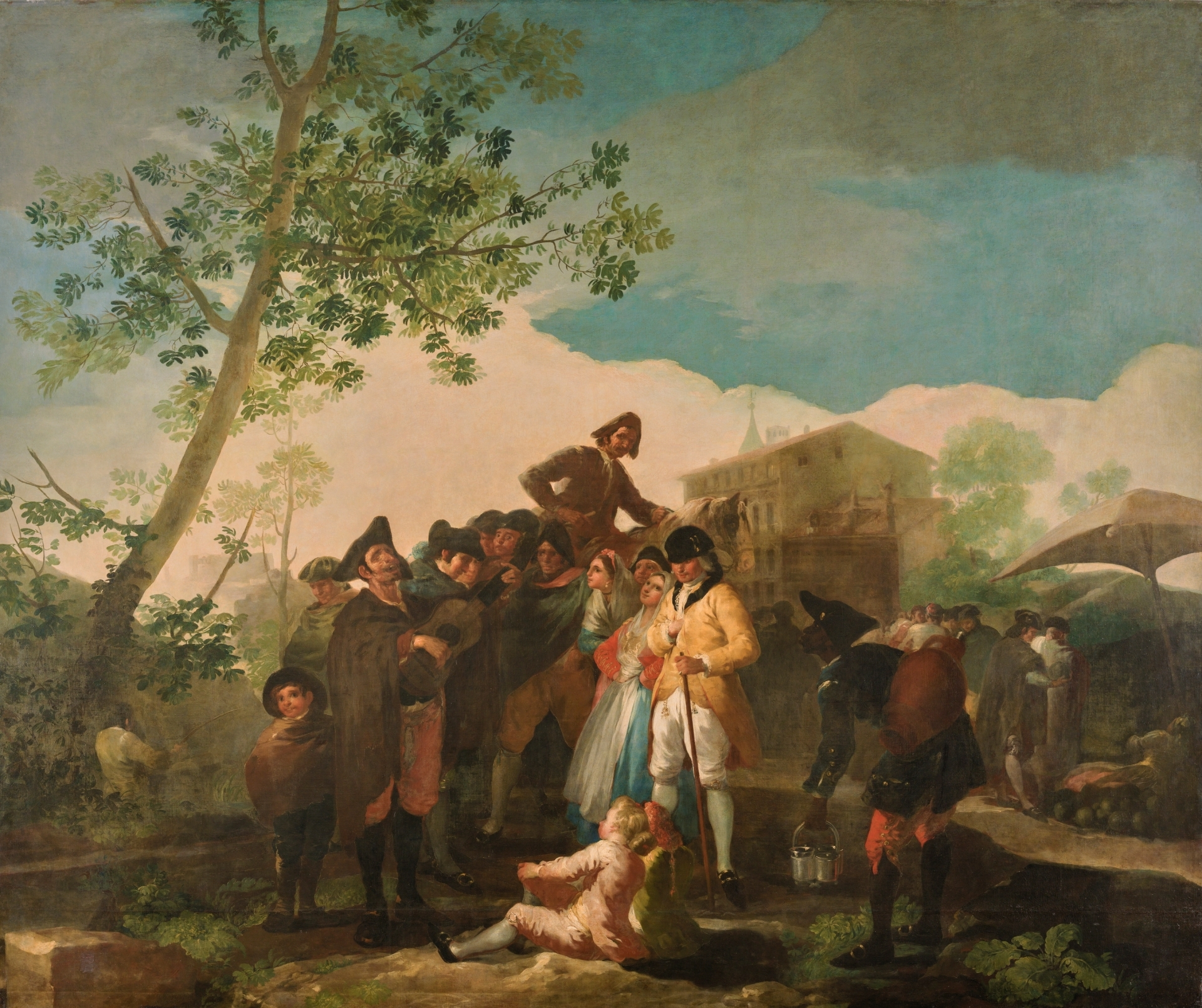 Cartones para tapices.